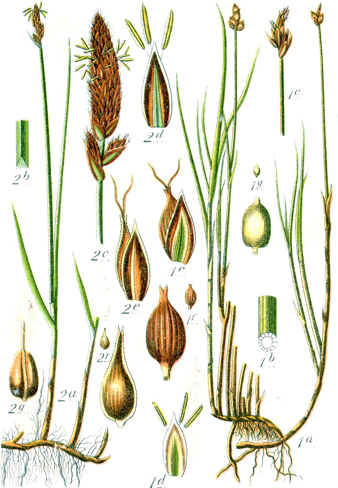 1. Carex chordorrhiza L.f., 2. Carex disticha Huds. Original Caption 1. Fadenwurzel-Segge, Carex chordorrhiza 2. Zeilen-Segge, C. disticha